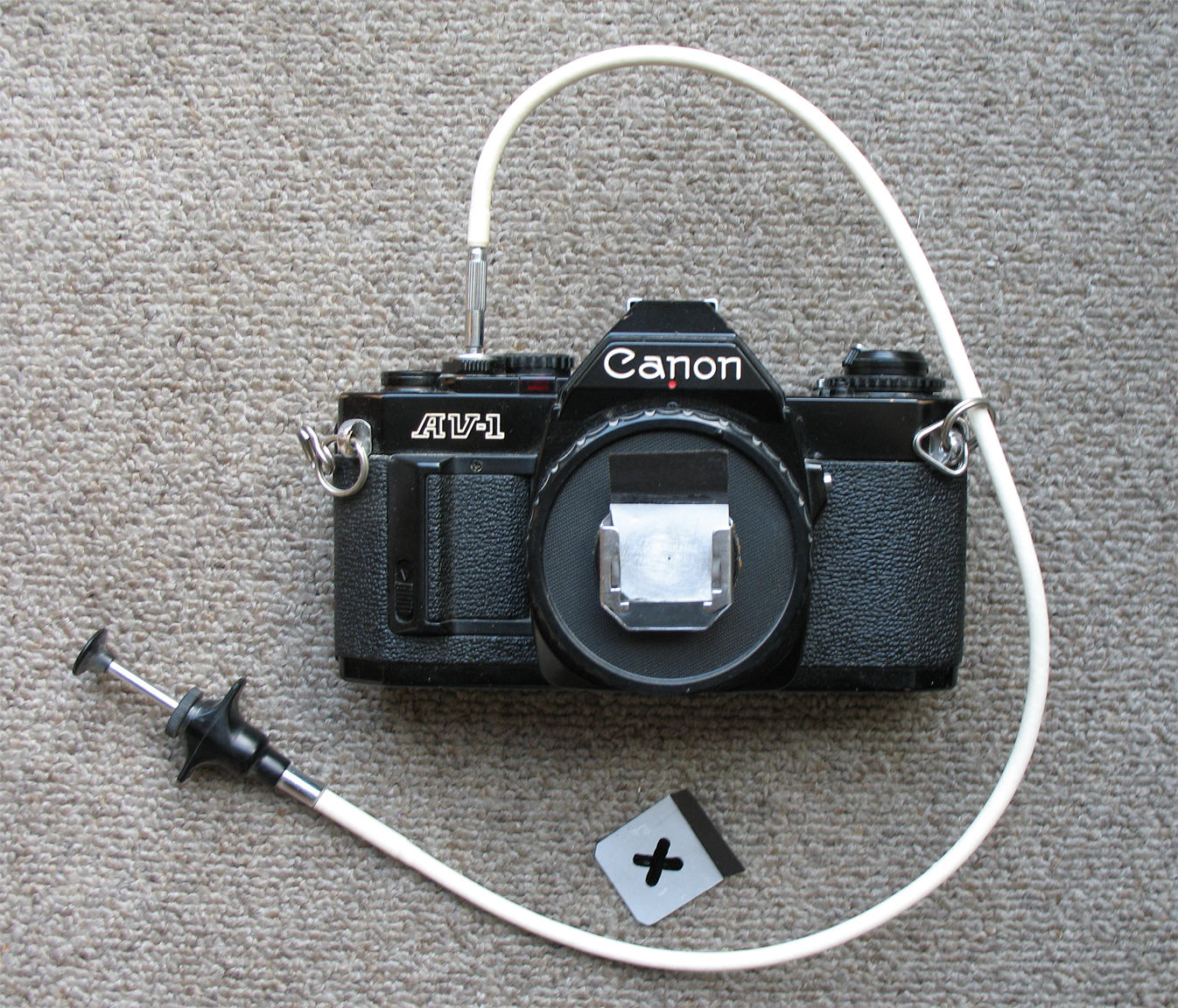 pinhole camera (selfmade)